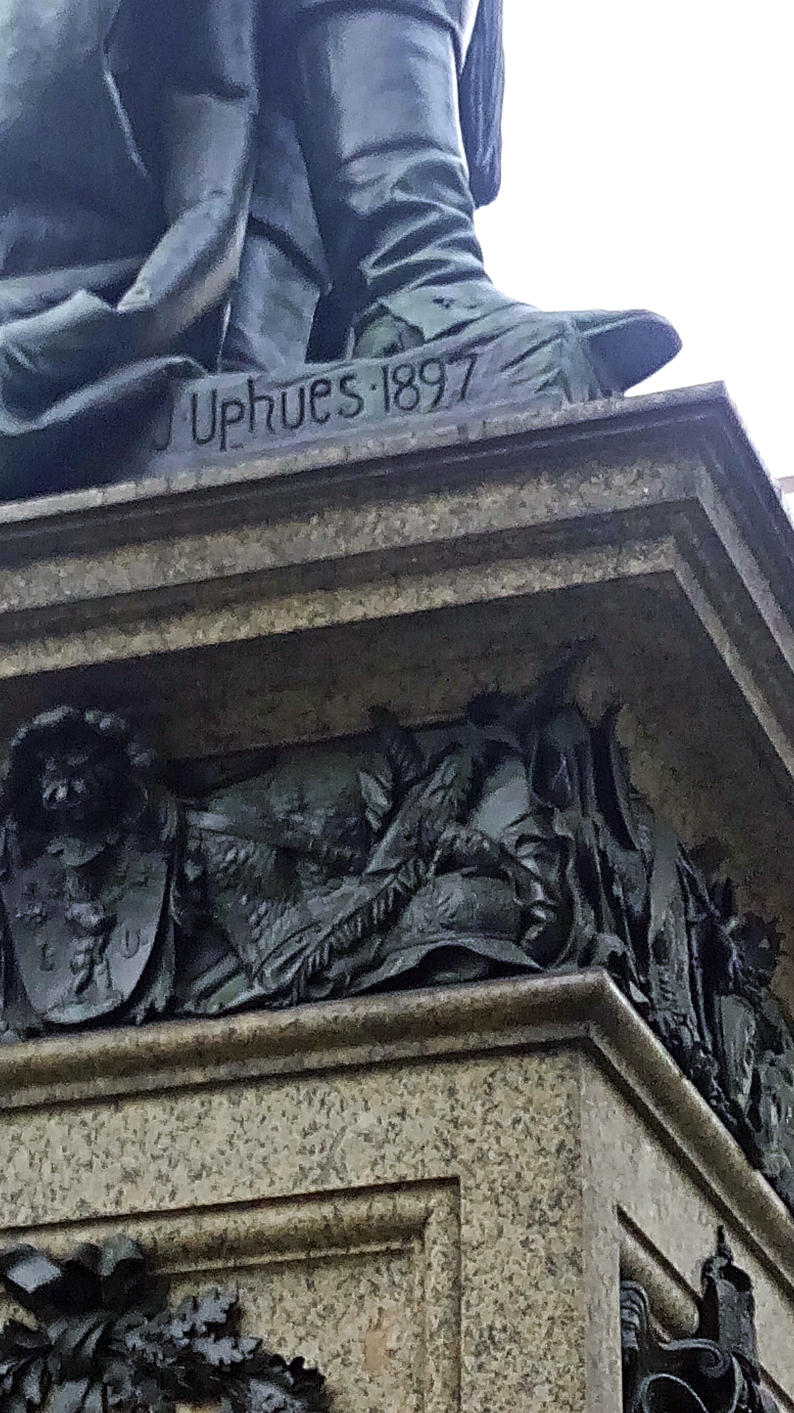 Kaiser Friedrich Denkmal Wiesbaden Signatur "J. Uphues 1897"